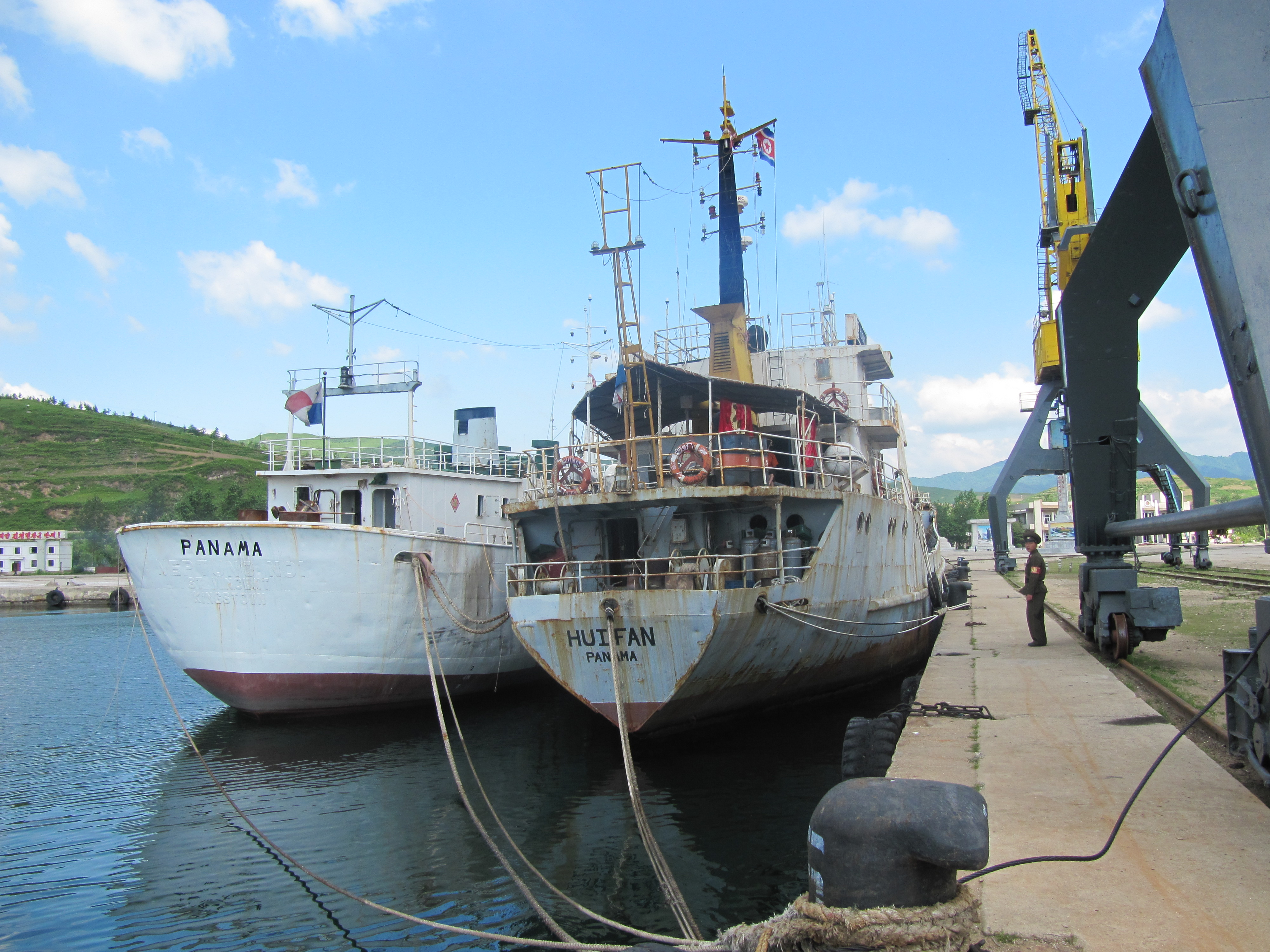 Rajin Port